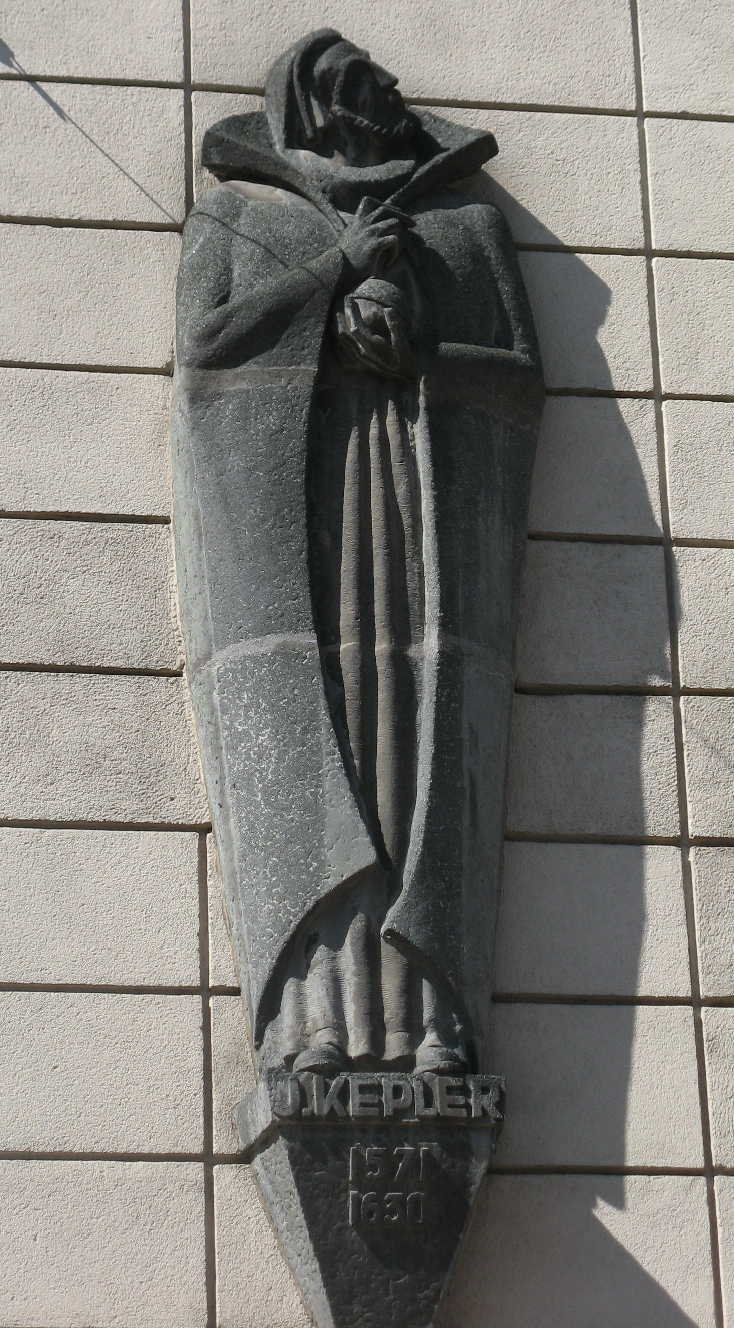 Johannes Kepler, Skulptur am Haus Favoritenstraße 108, Wien-Favoriten